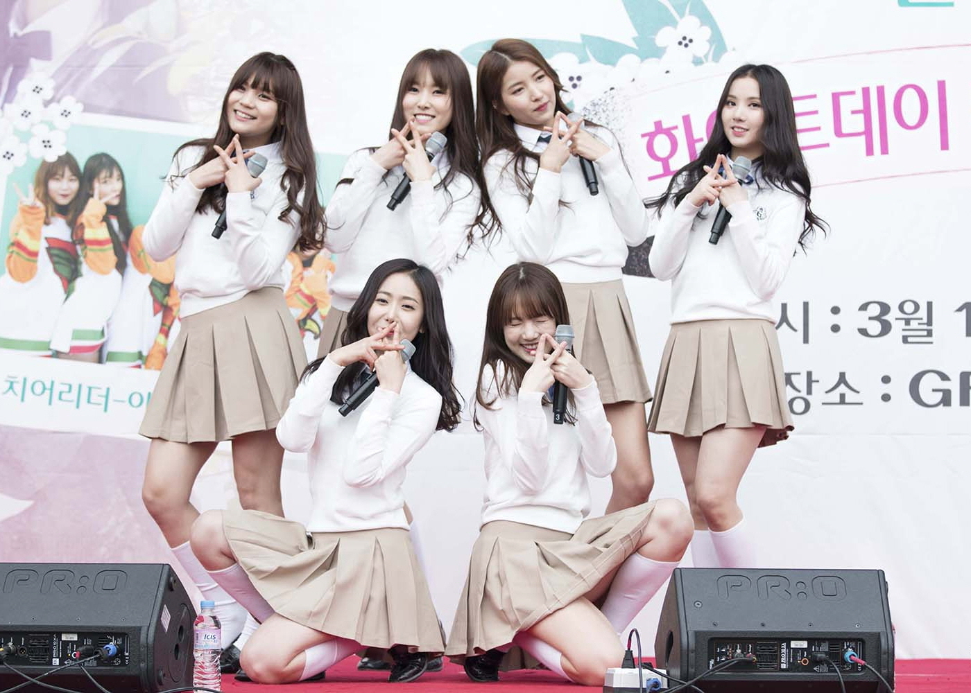 16.03.13 롯데몰 김포공항 여자친구